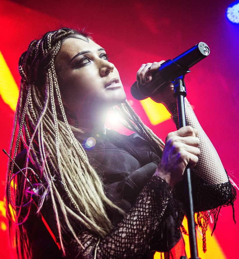 Линда на концерте в московском клубе RED 25 мая 2018 года